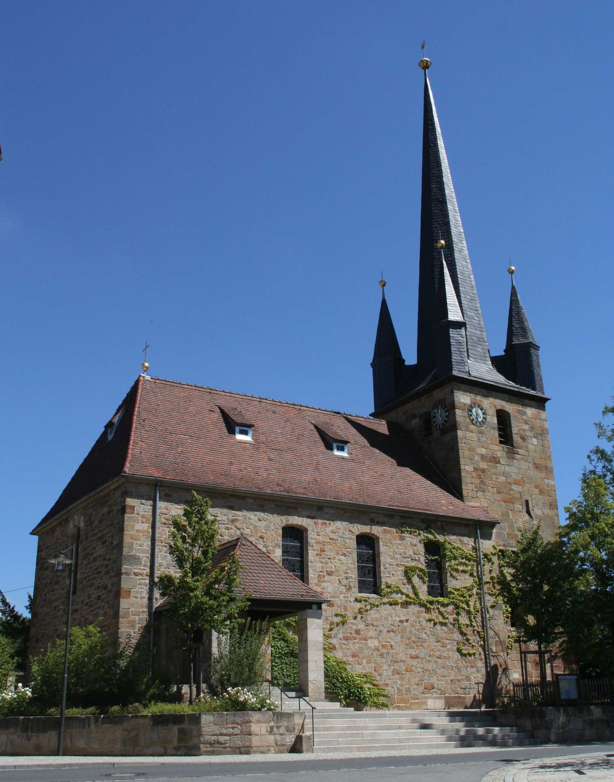 ev. Kirche Ebersdorf b. Coburg evangelische St.-Laurentius-Kirche in Ebersdorf Landkreis Coburg